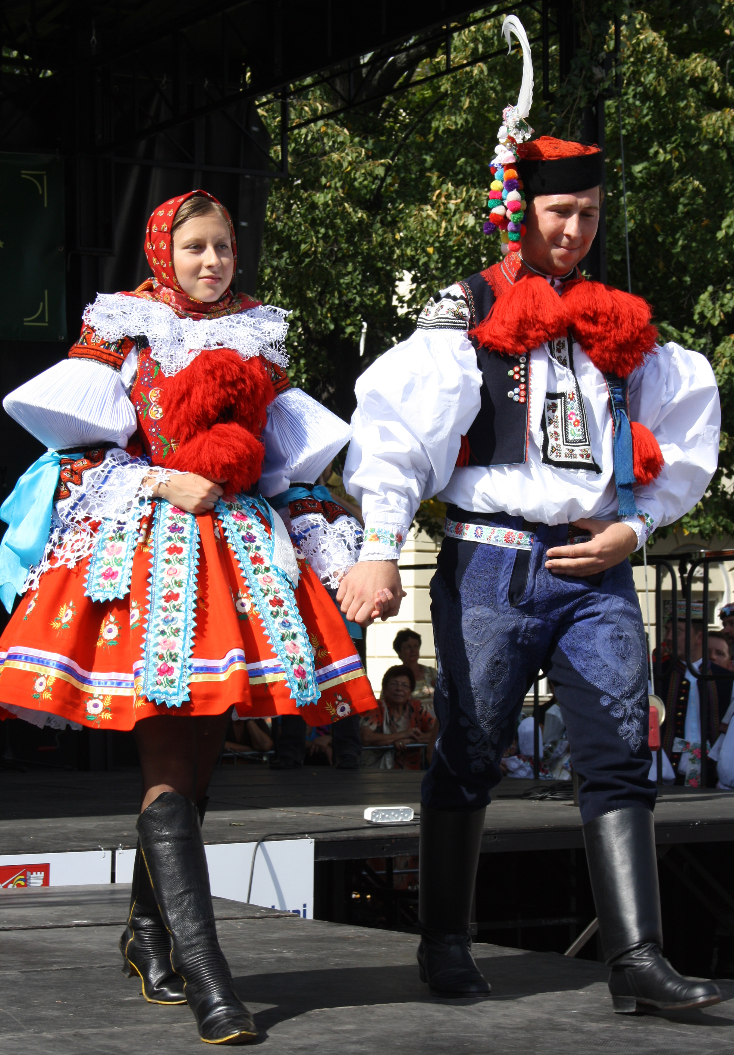 Pohled na přední část kroje svobodného páru z Vlčnova (Slovácké slavnosti vína a otevřených památek v Uherském Hradišti 2011).